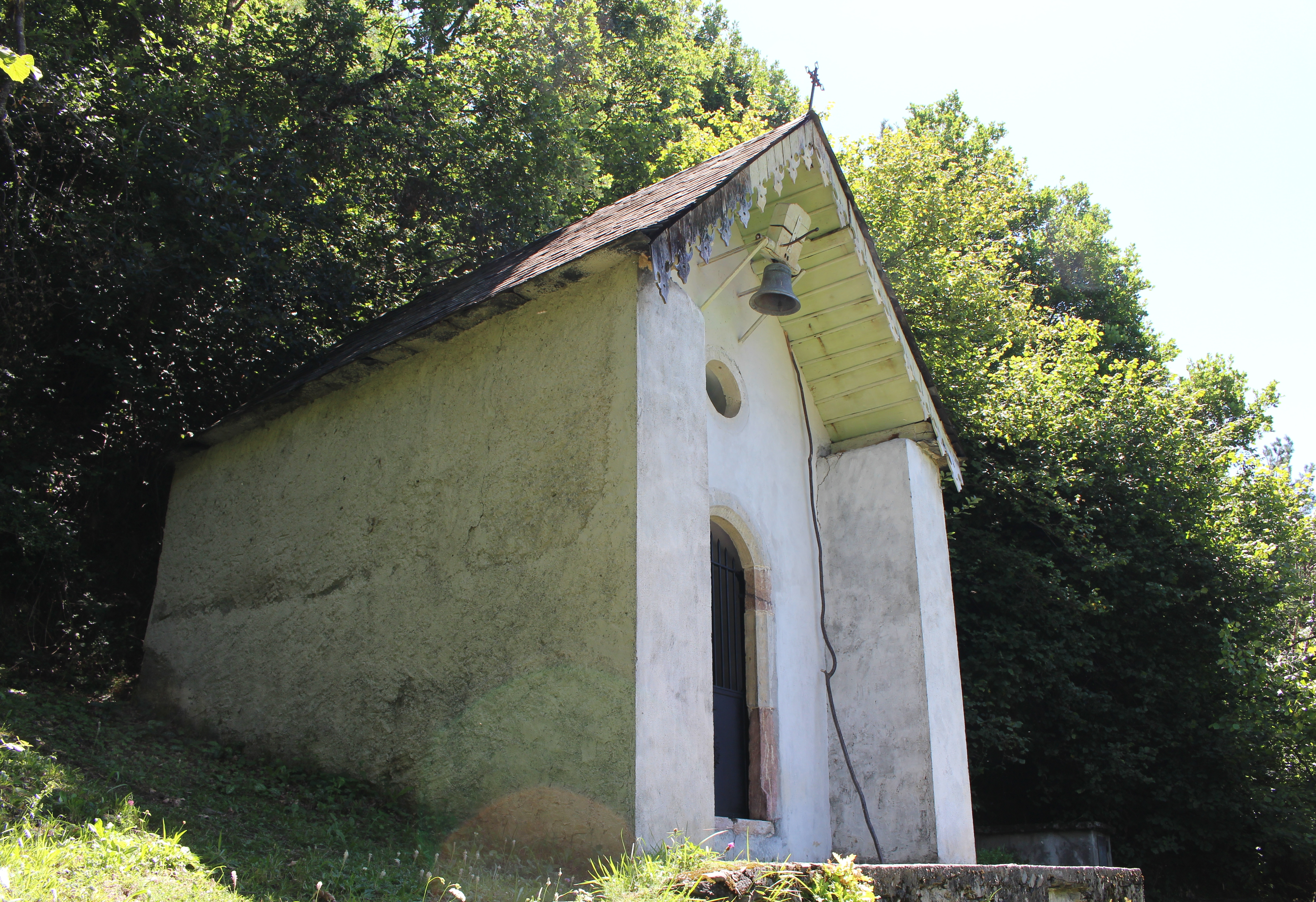 Chapelle Saint-Michel de Bazus-Aure (Hautes-Pyrénées)